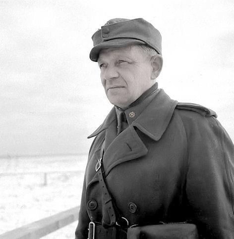 Jatkosodan Jalkaväkirykmentti 50:n komentaja majuri Martti Aho.